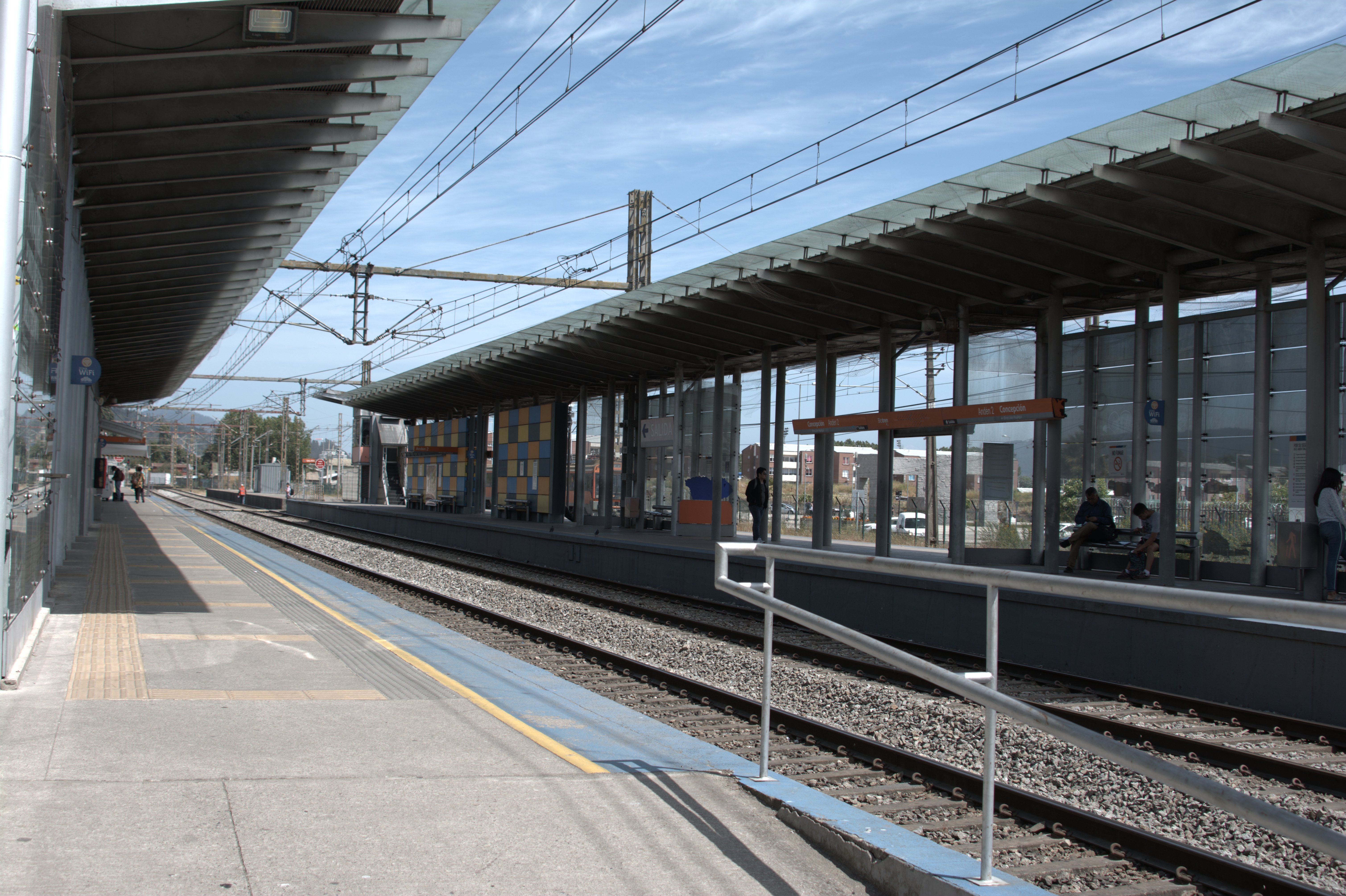 Estación Concepción, andenes. Concepción, diciembre de 2019